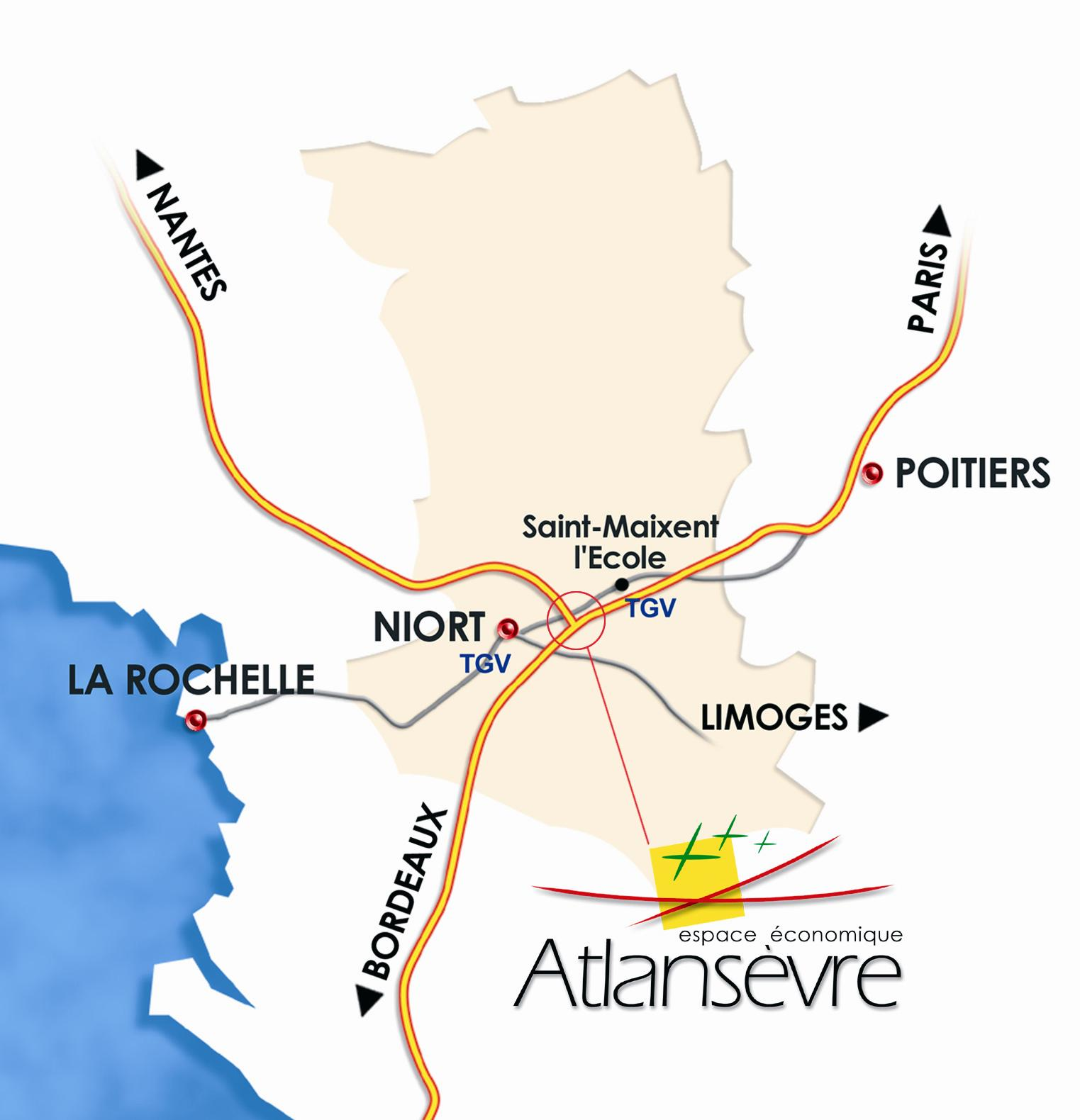 Plan de localisation du pôle économique Atlansèvre